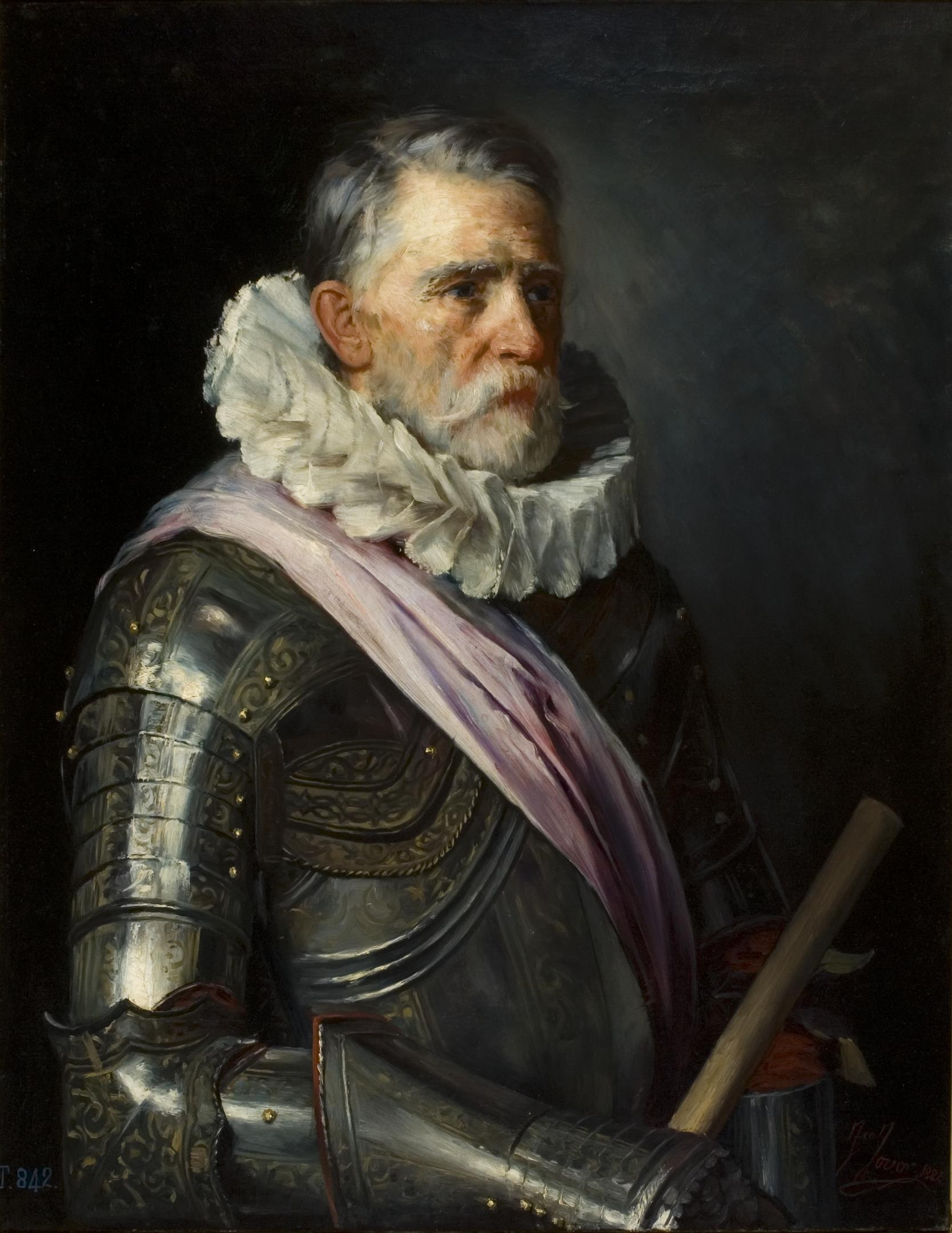 Retrato del militar y político español Luis de Requesens y Zúñiga (1528-1576).